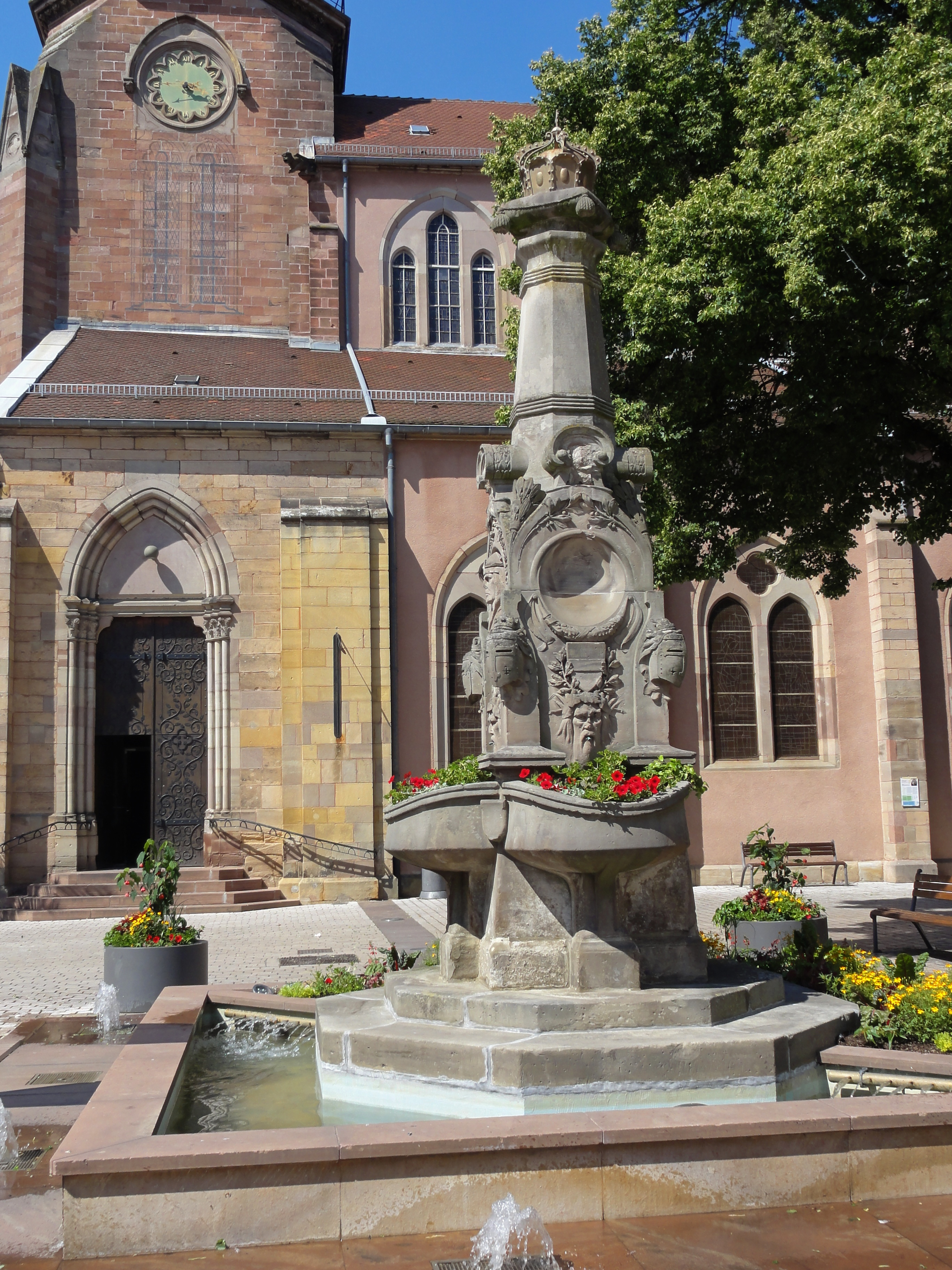 Alsace, Haut-Rhin, Ensisheim, Fontaine "Rodolphe Ier de Habsbourg" (1900), place de l'Eglise.